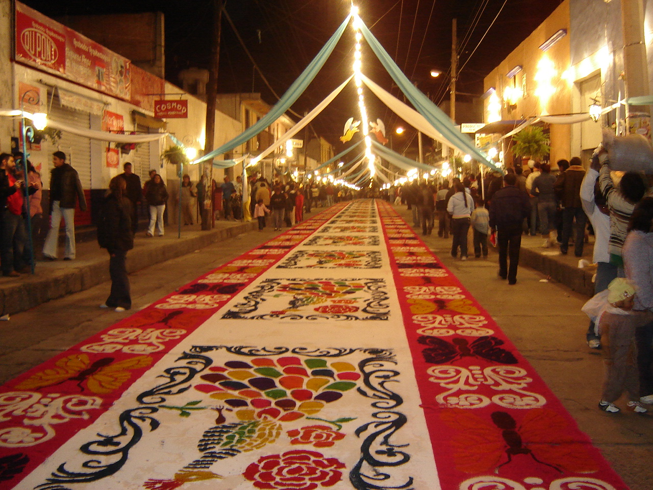 Alfombra de aserrín que se hacen en la feria de Huamantla, Tlax., en la noche que nadie duerme